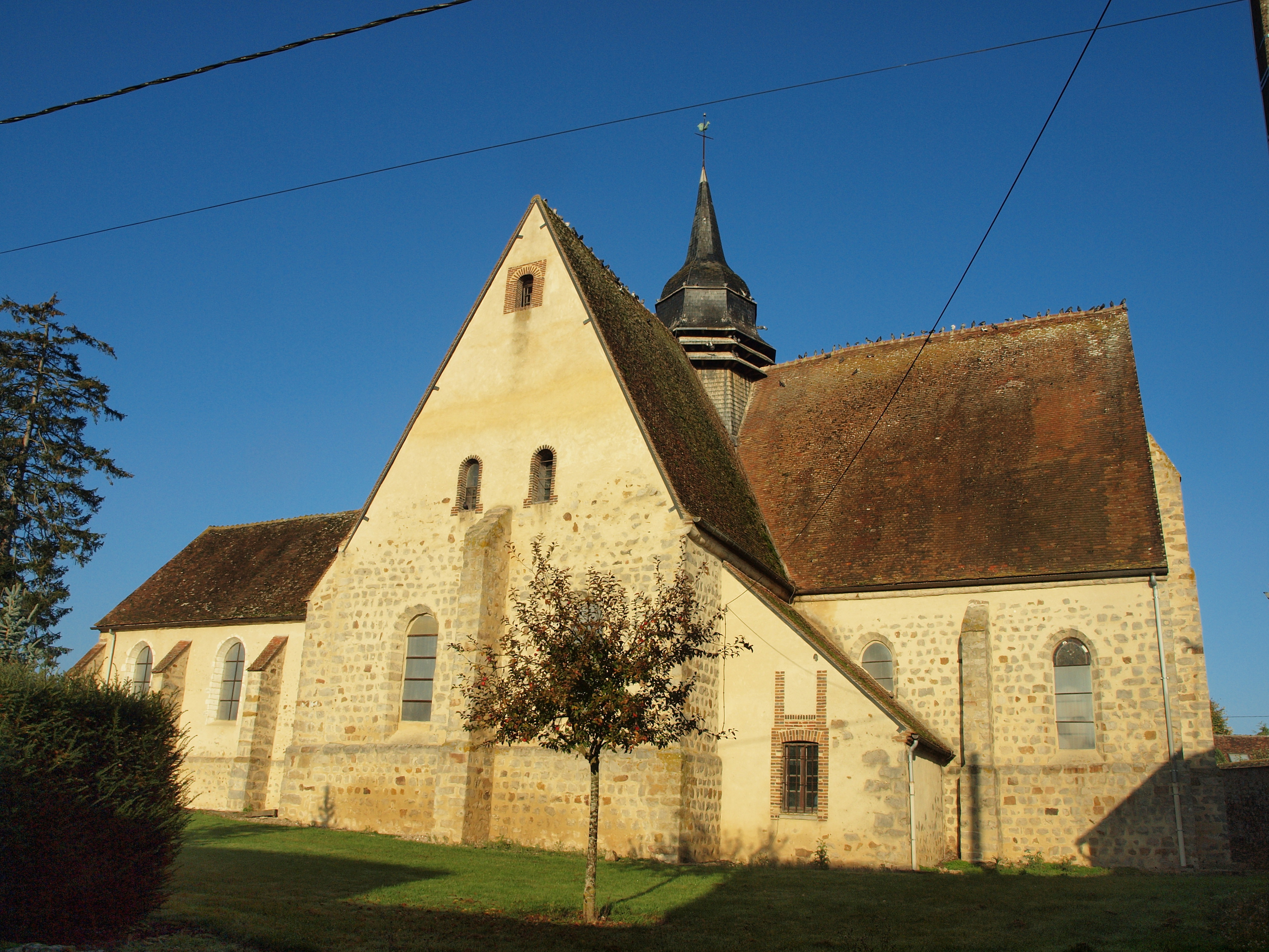 Courgenay (Yonne, France)